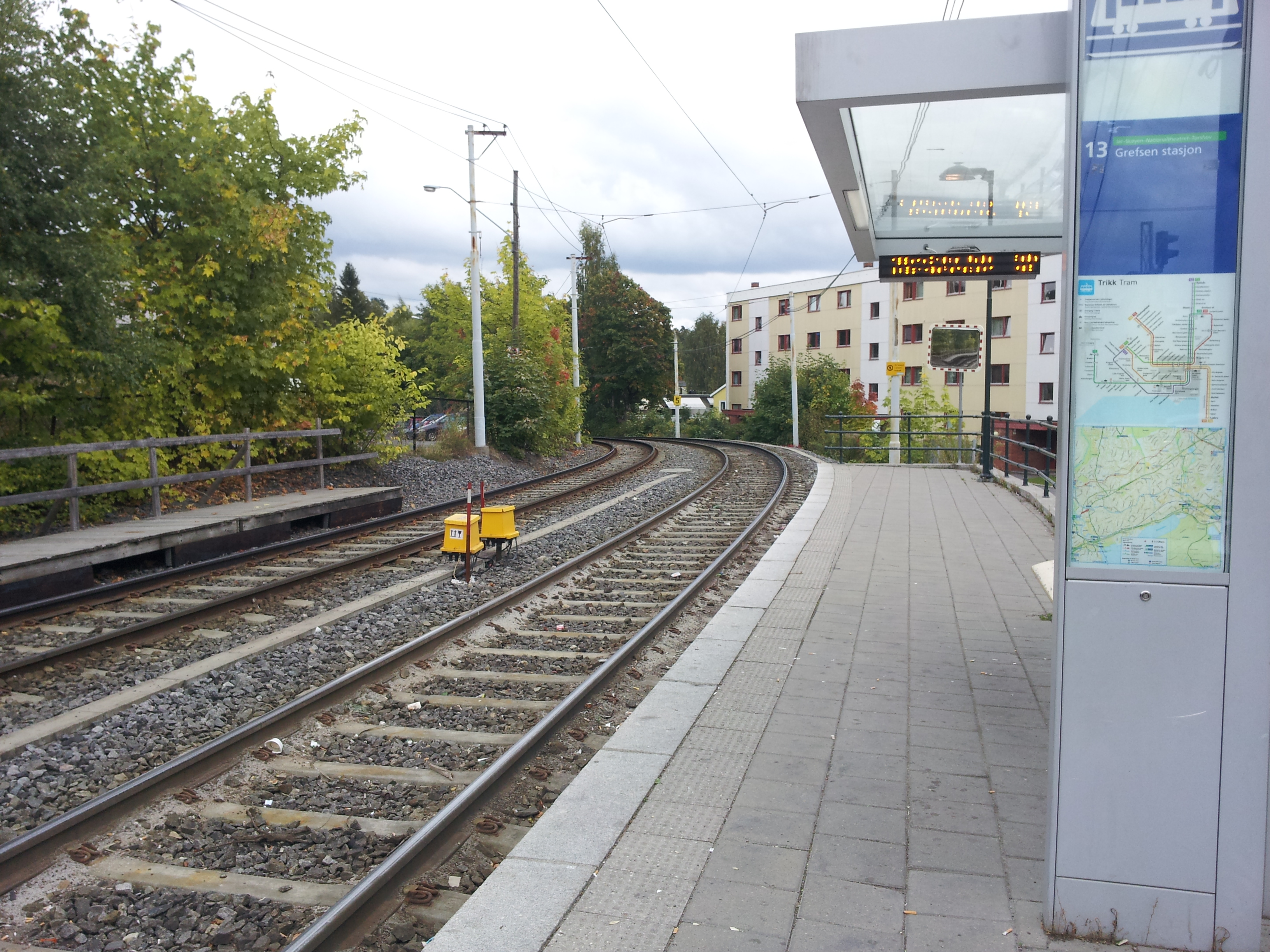 Lilleaker trikkeholdeplass, plattform retning sentrum.